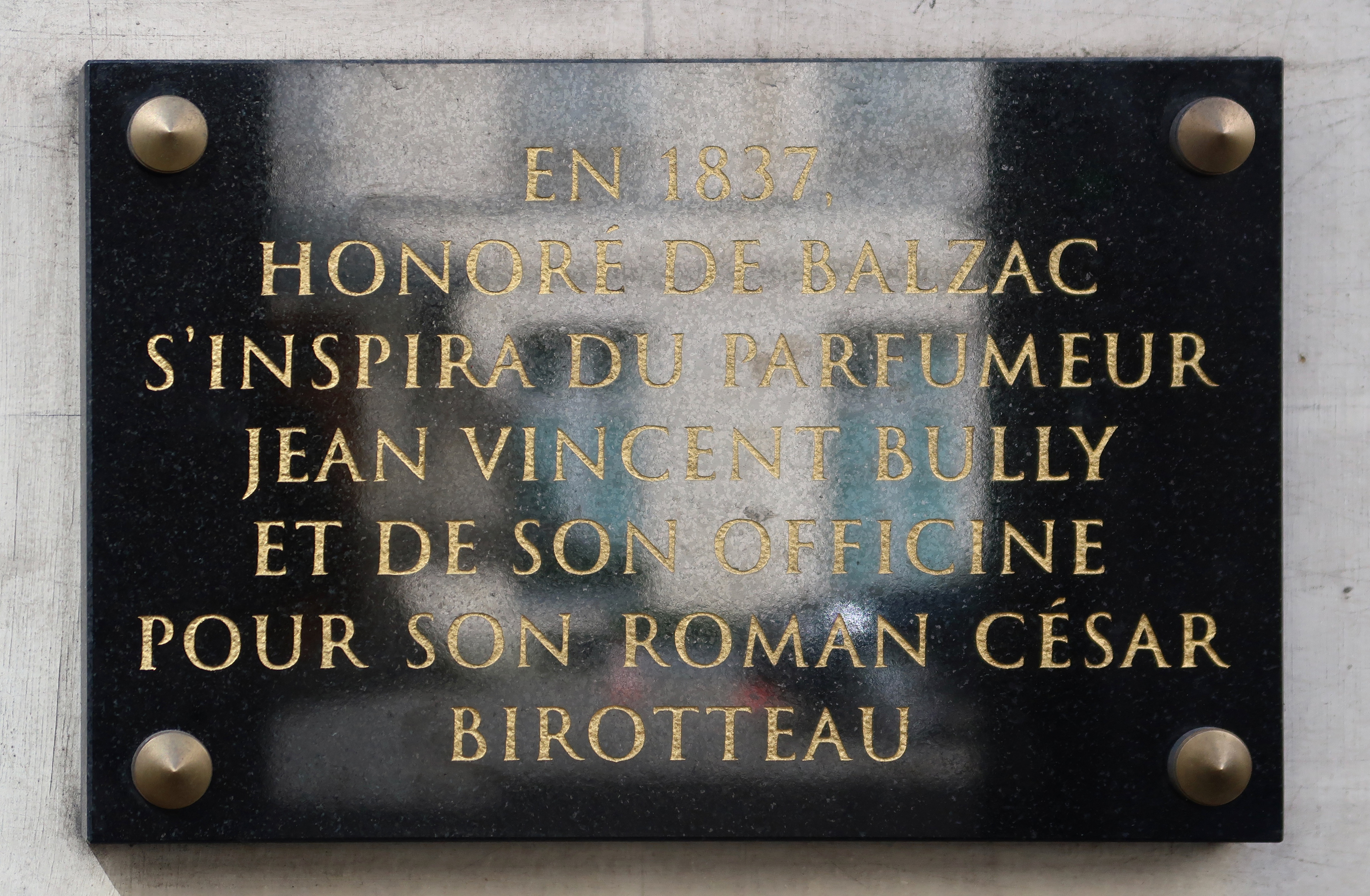 Plaque en hommage à Honoré de Balzac, 6 rue Bonaparte (Paris, 6e).